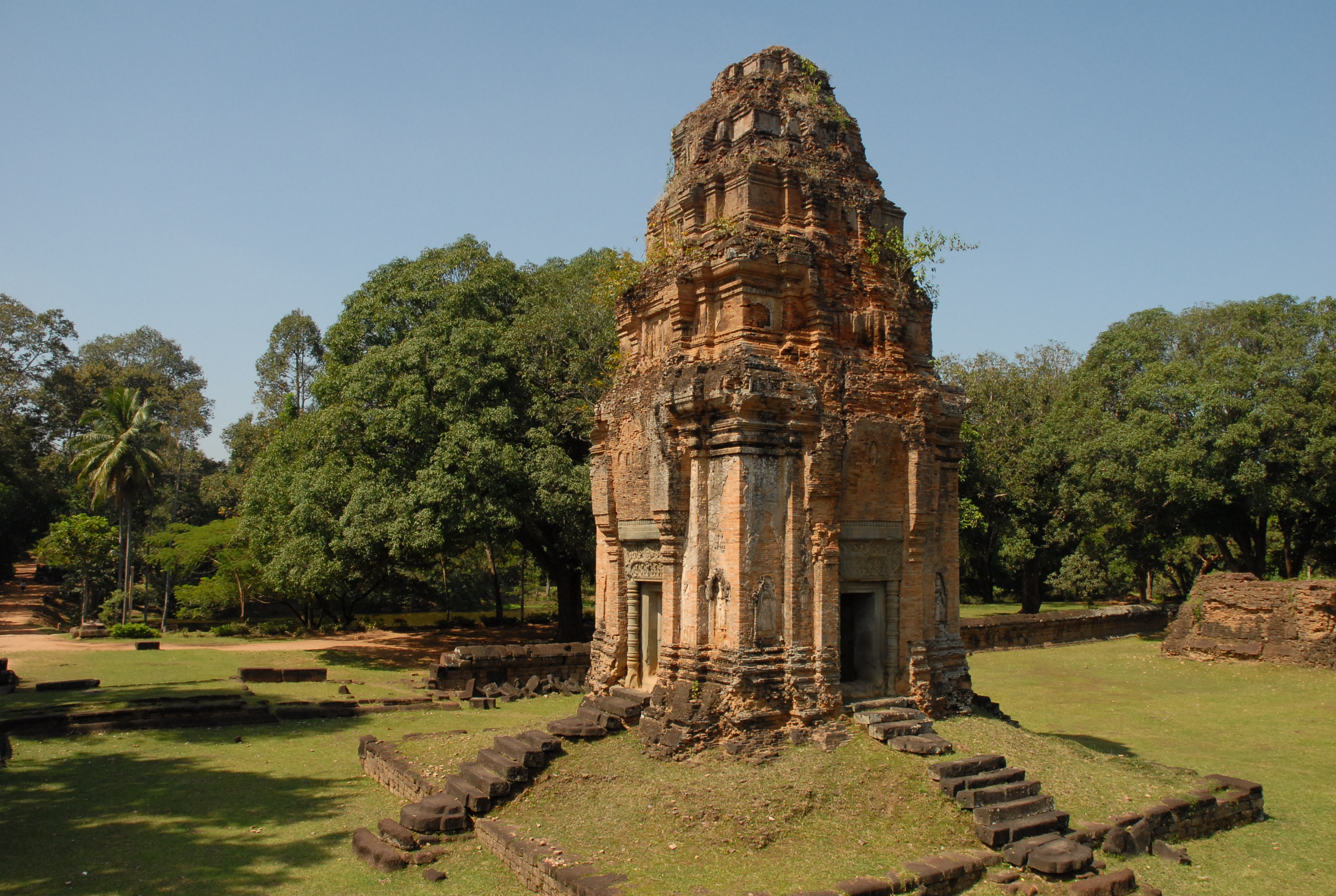 Cambodge, site archéologique d'Angkor (zone de Rolûos), temple de Bakong : une des 8 tours annexes en briques